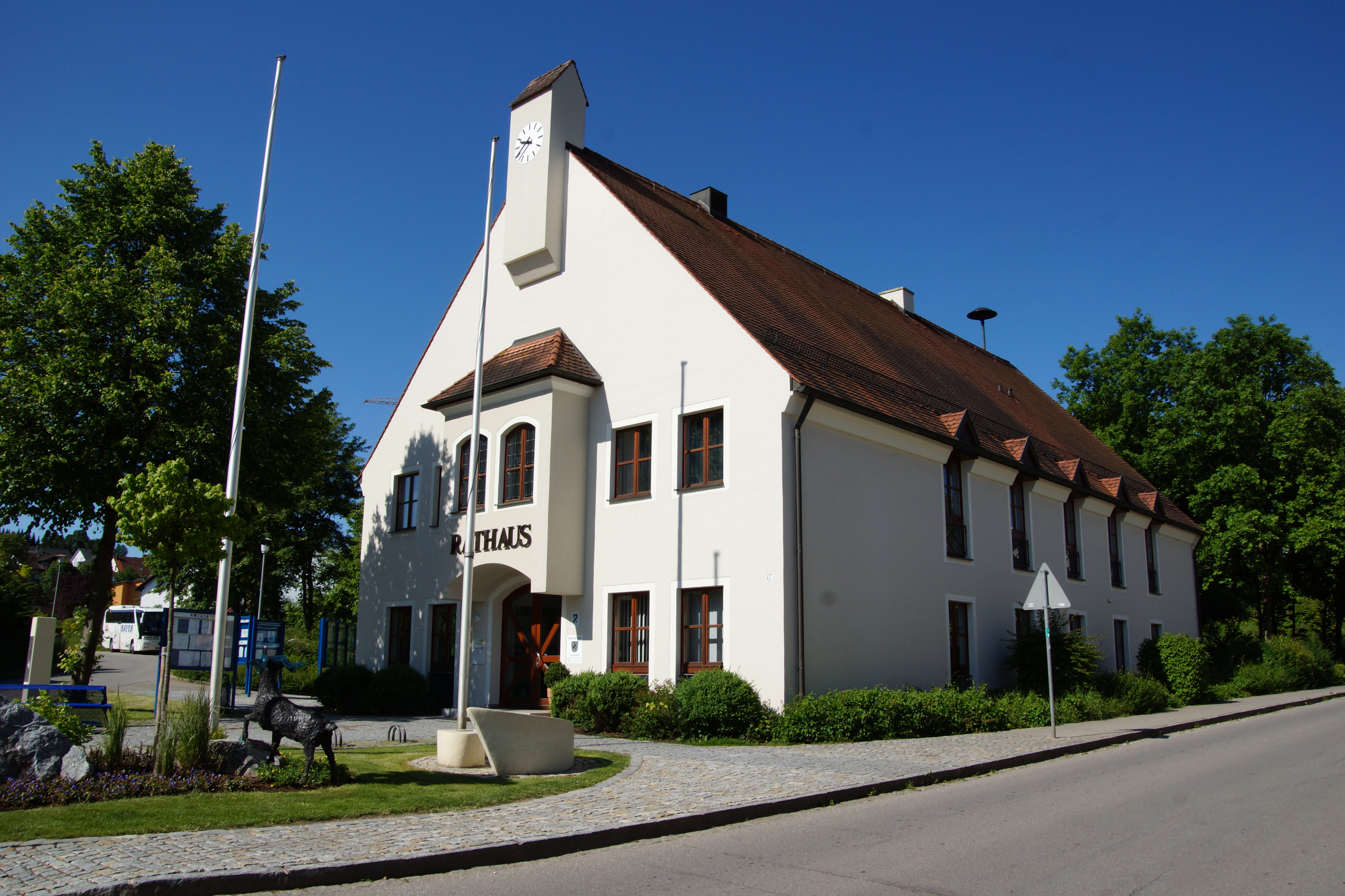 Der Oberpfälzer Markt Rieden im Vilstal